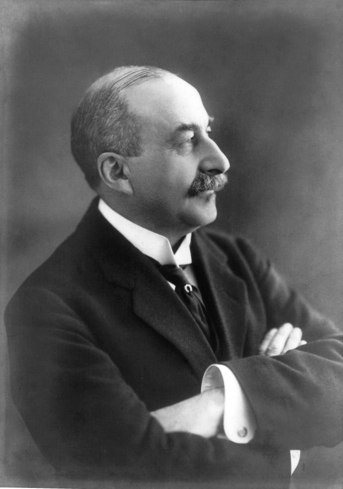 Léon Delacroix, premier ministre belge entre 1918 et 1920.